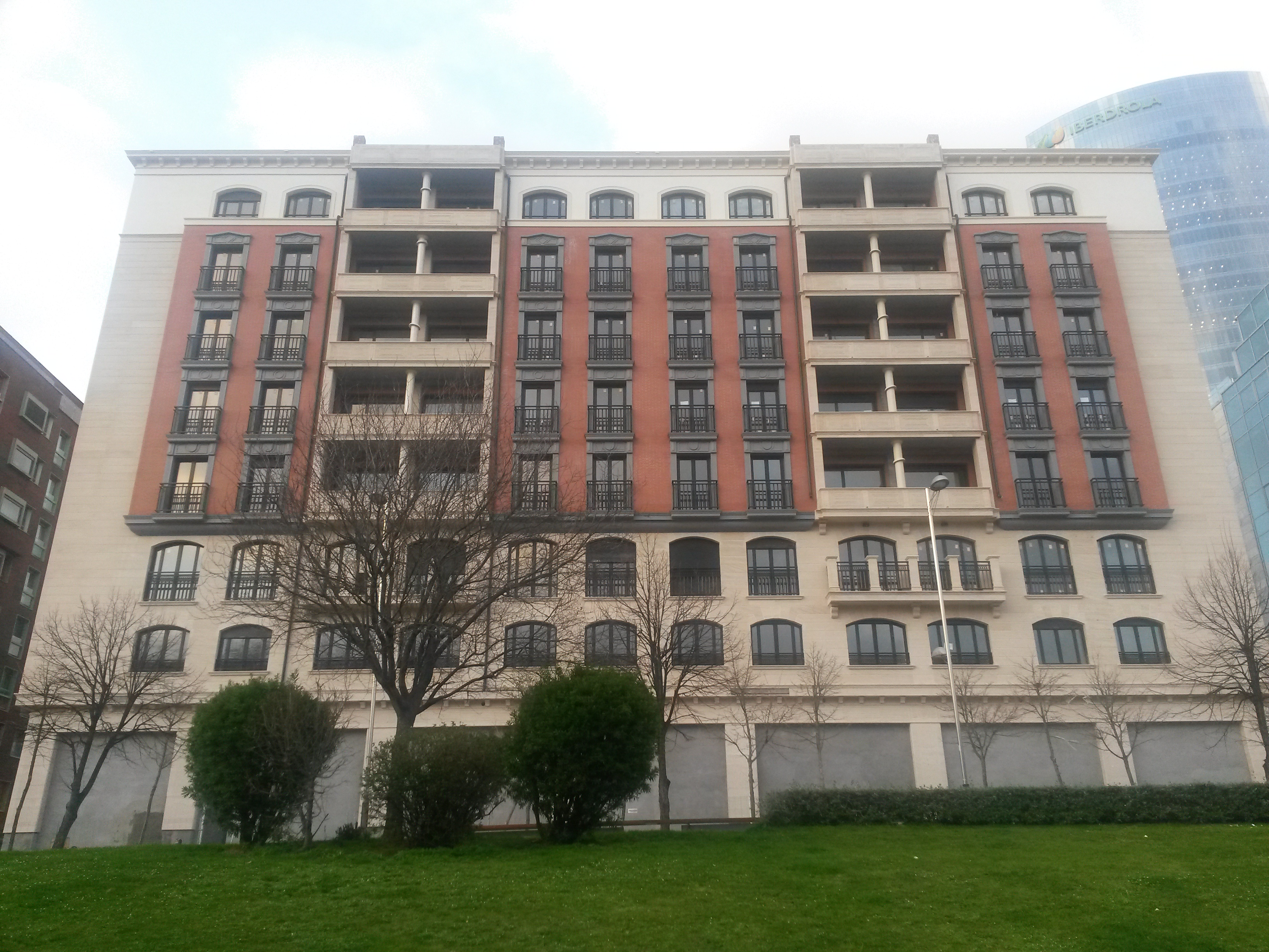 Residencial Parkeder, en construcción (marzo 2016).